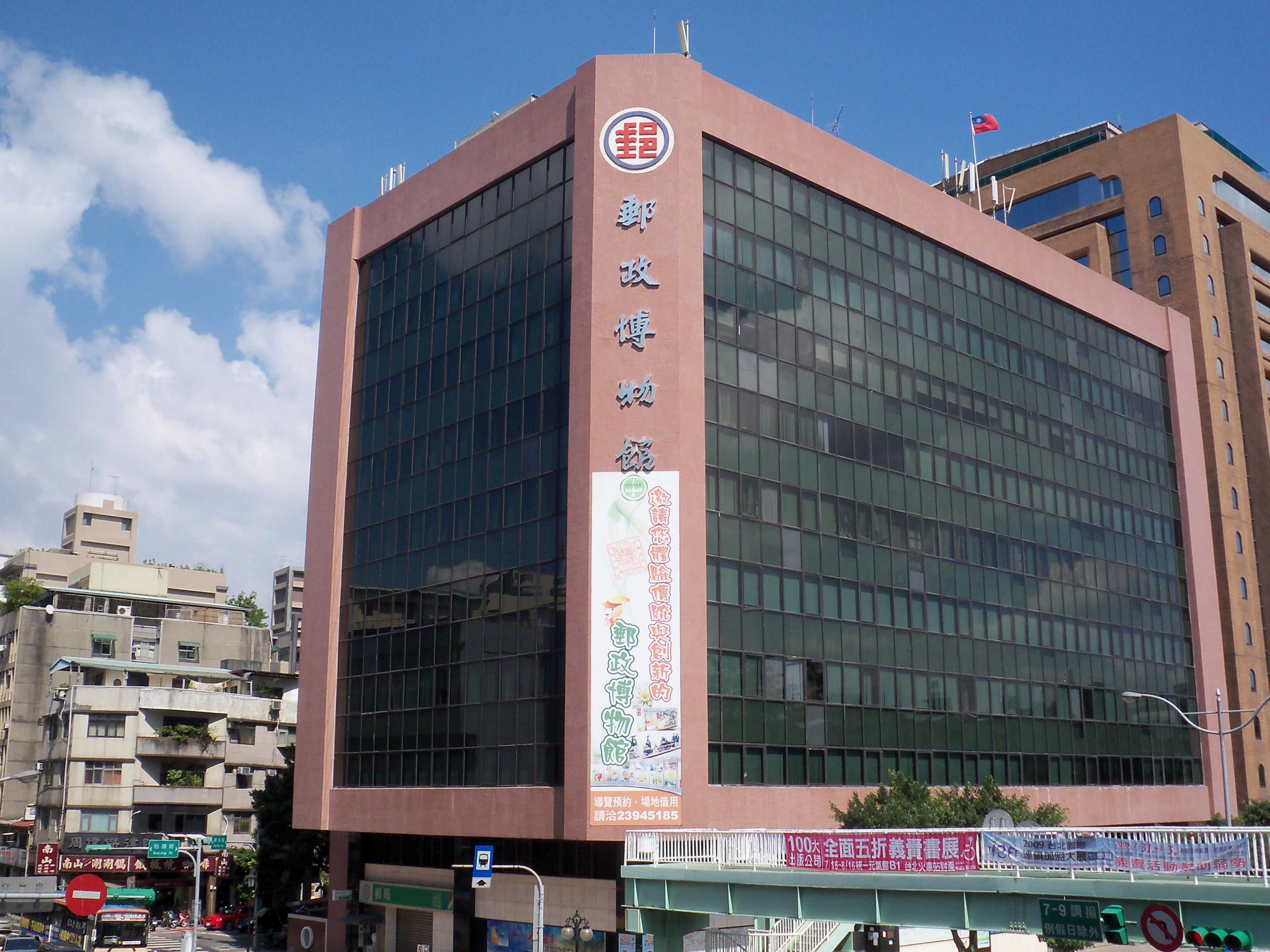 台湾・台北市の郵政博物館、所在地：台北市中正区重慶南路二段45号。